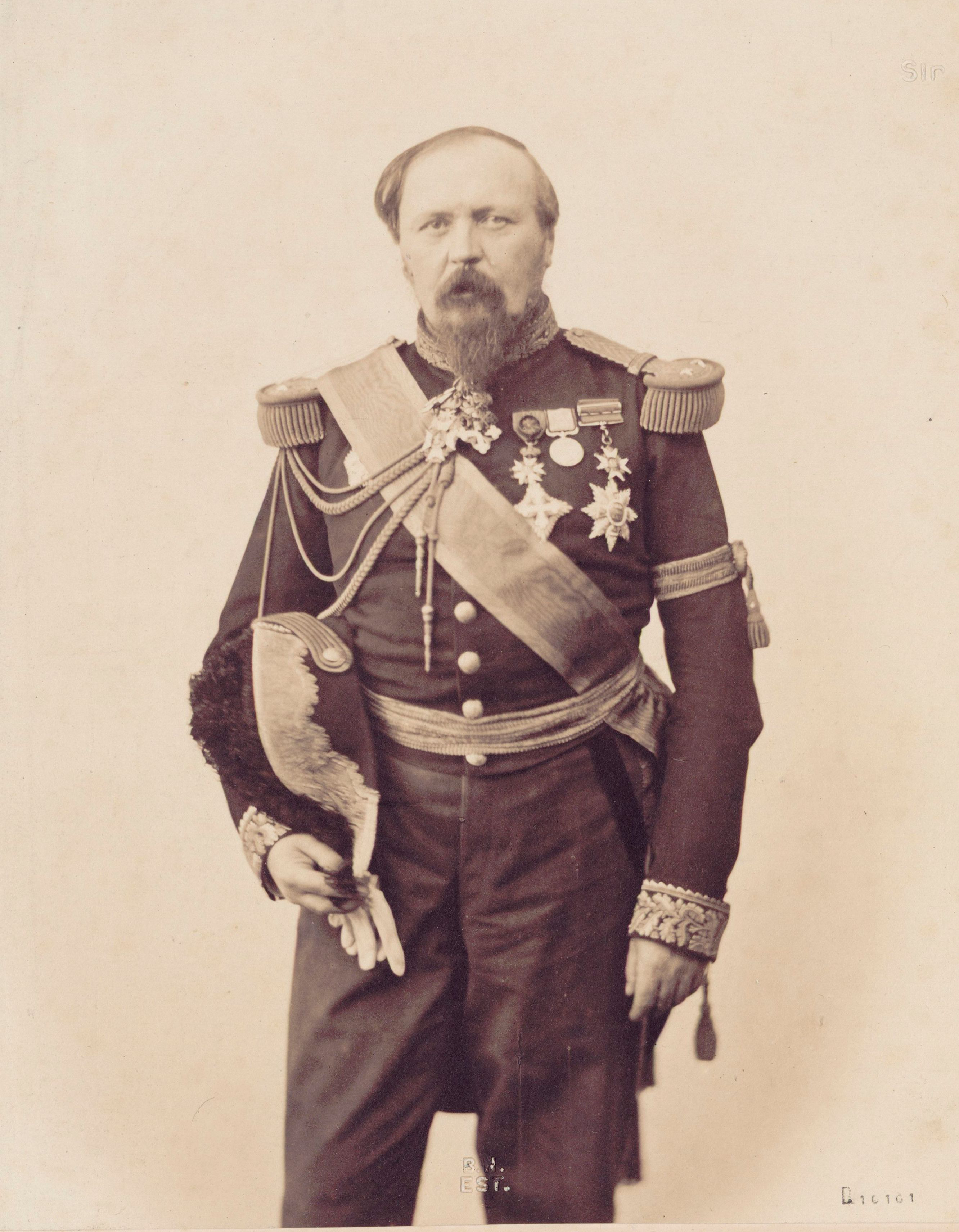 Louis Gaspard Gustave Adolphe Yvelin de Béville